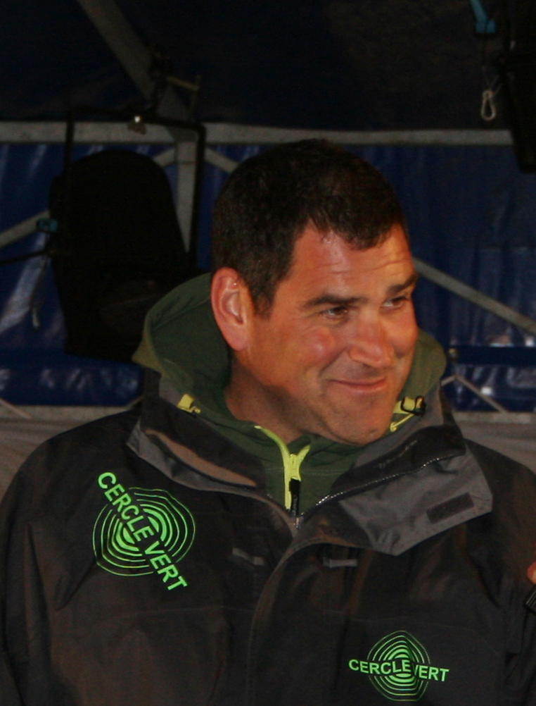 Description =Gildas Morvan. Soirée présentation des skippers a Belle-Ile lors du Trophée BPE Source =Photo taken by Remi Jouan Date =Mars 2007 Author =Remi Jouan